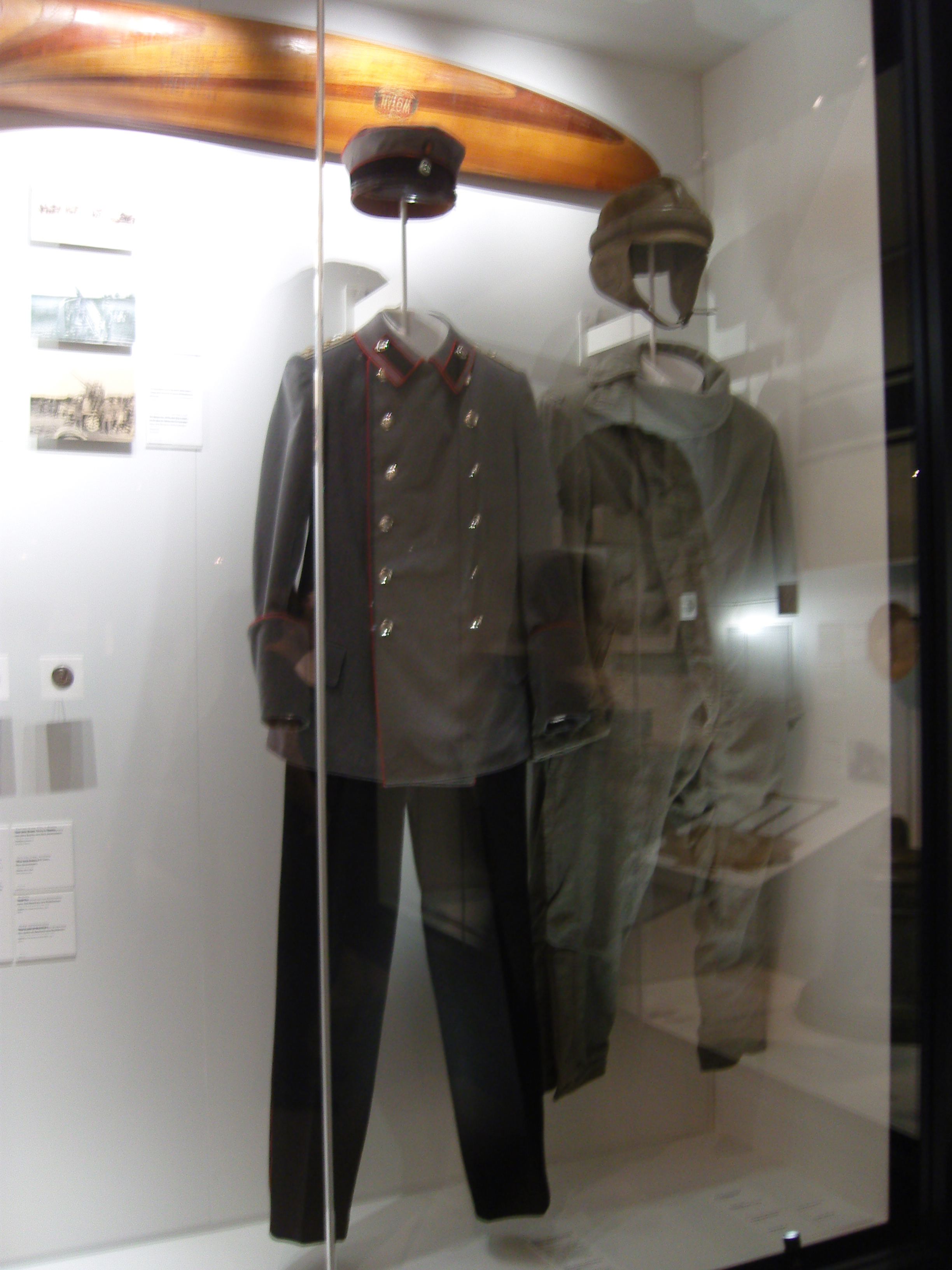 Feldmütze, Litewka und Hose des Piloten Max Immelmann im Militärhistorischen Museum der Bundeswehr